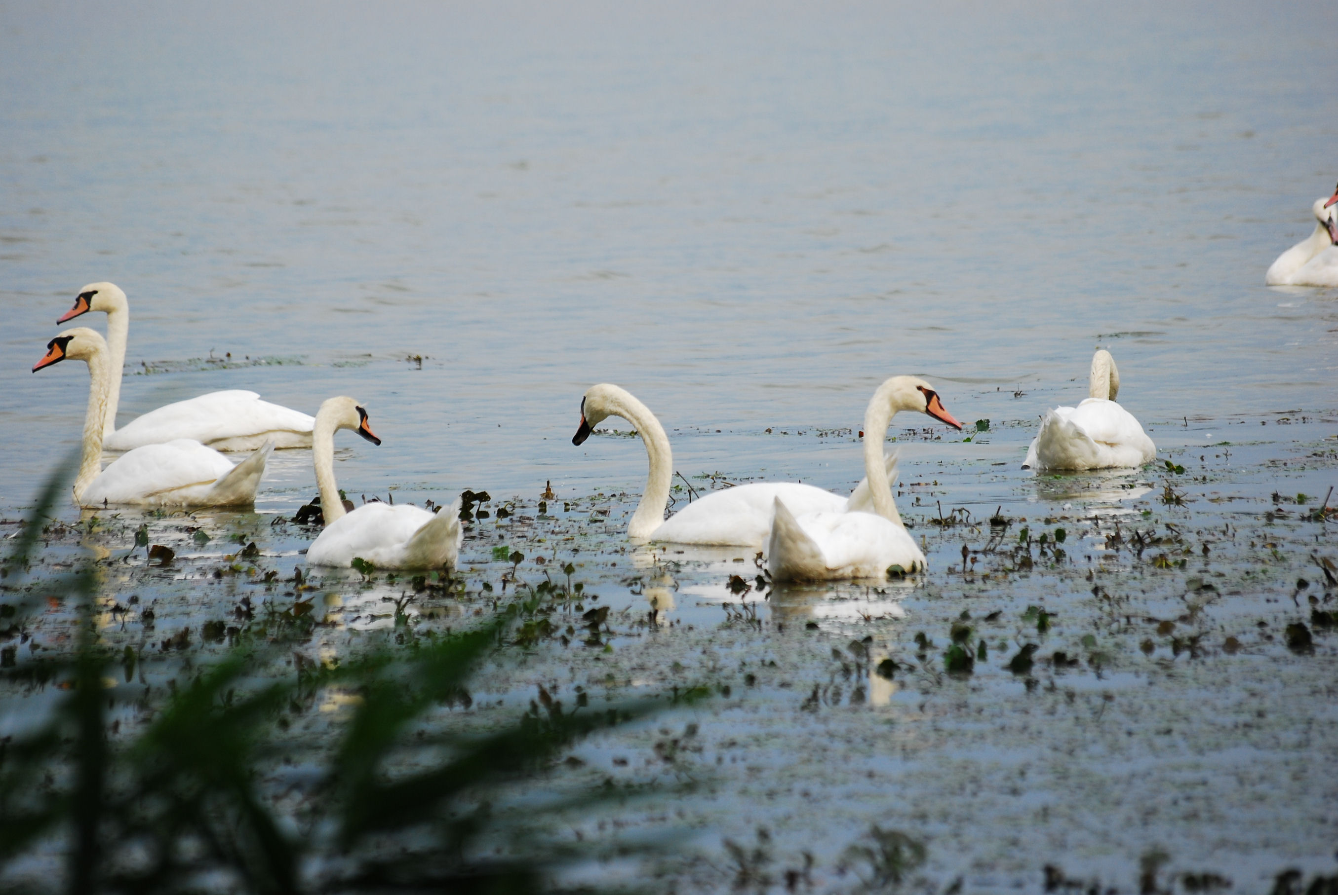 Rezerwat przyrody Łęźczok w powiecie raciborskim